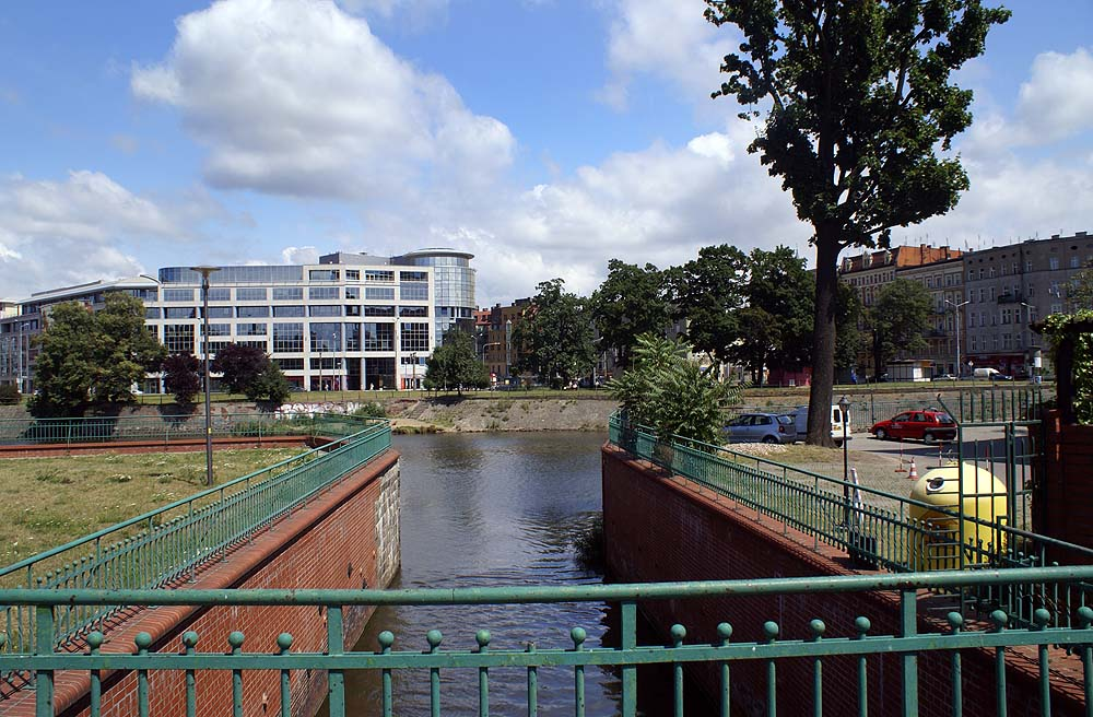 Teren Stare Miasto wraz z zabudową i układem komunikacyjnym oraz zarysem wód w granicach zewnętrznego obrysu pozostałości dawnych fos miejskich i południowych wybrzeży rzeki OdryPomnik Historii – zarządzenie Prezydenta RP z 08-09-1994 r. MP nr 50, poz. 425.„Wrocław – zespół historycznego centrum” Stare i Nowe Miasto oraz wyspy odrzańskie. Granica przebiega: Mostem Uniwersyteckim, ulicami Drobnera, przez pl. Bema, Sienkiewicza, Wyszyńskiego, Mostem Pokoju, Ob. Słowackiego, Krasińskiego, Traugutta, Podwalem, południowym brzegiem Dolnej Odry do Mostu Uniwersyteckiego. Stare Miasto, Miasto Wrocław - Stare Miasto